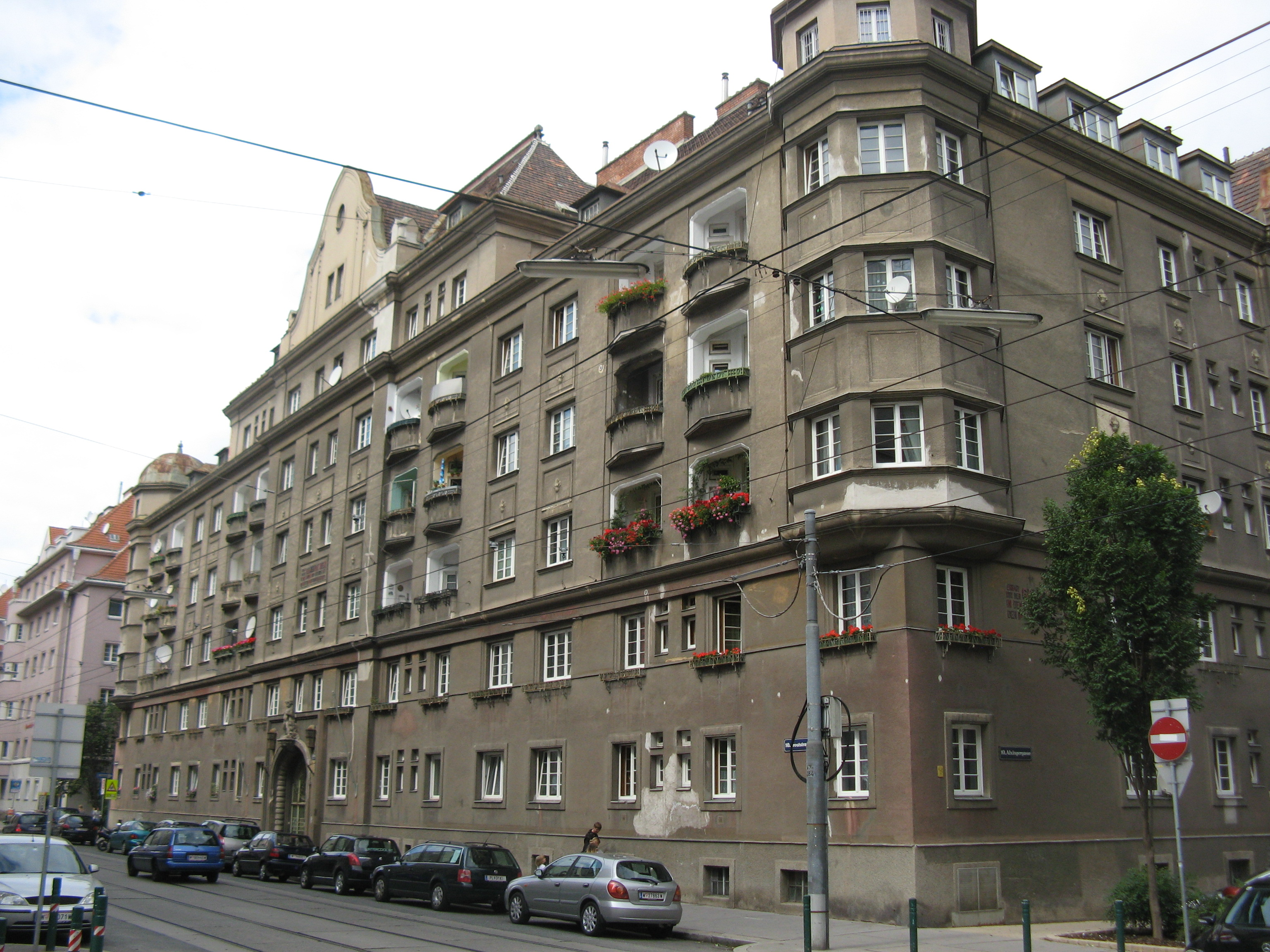 Wohnhausanlage (1924-25) von Klemens Kattner und Alexander Graf, Troststraße 64-66, Wien-Favoriten This media shows the Vienna residential building (Gemeindebau) with the ID 726.